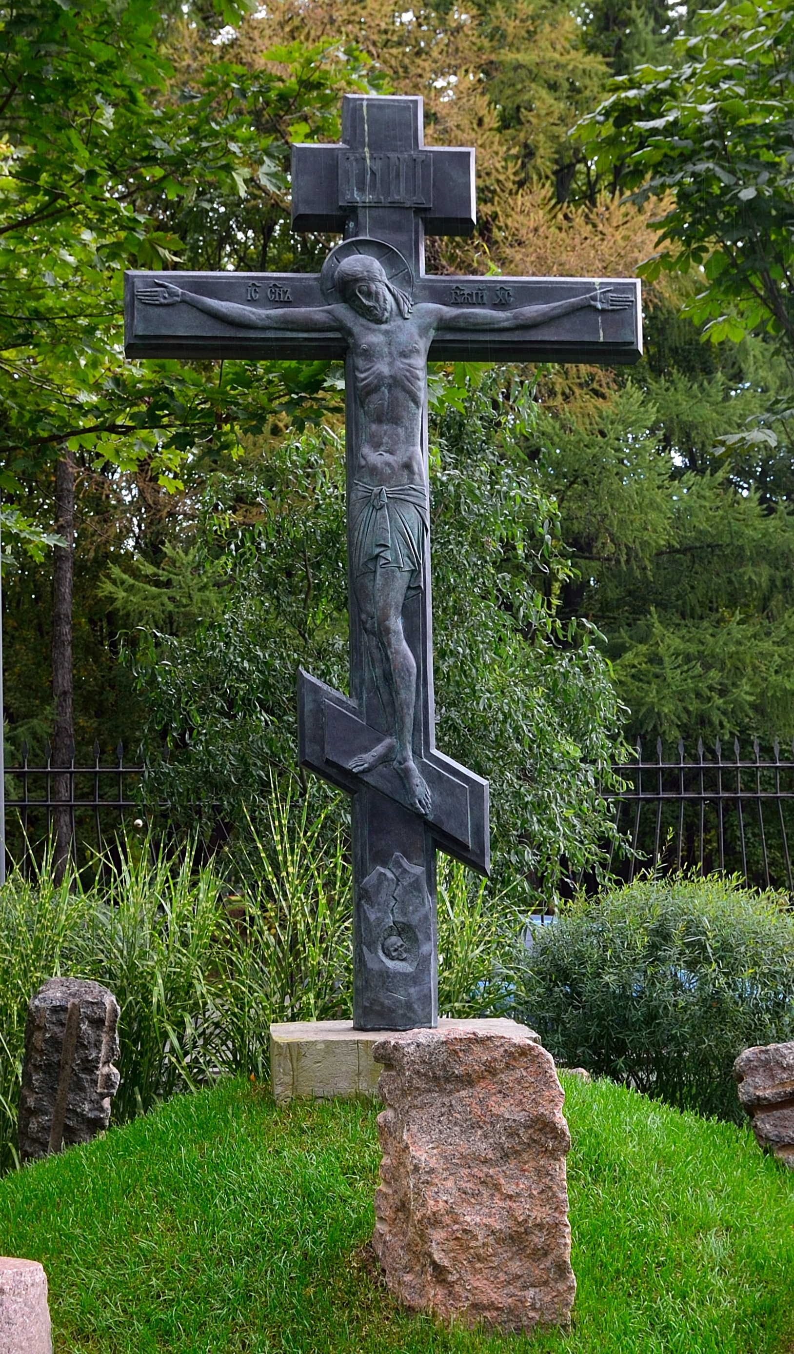 Церковь Благовещения в Петровском парке: Красноармейская ул., дом 2А, Аэропорт, Северный округ, Москва